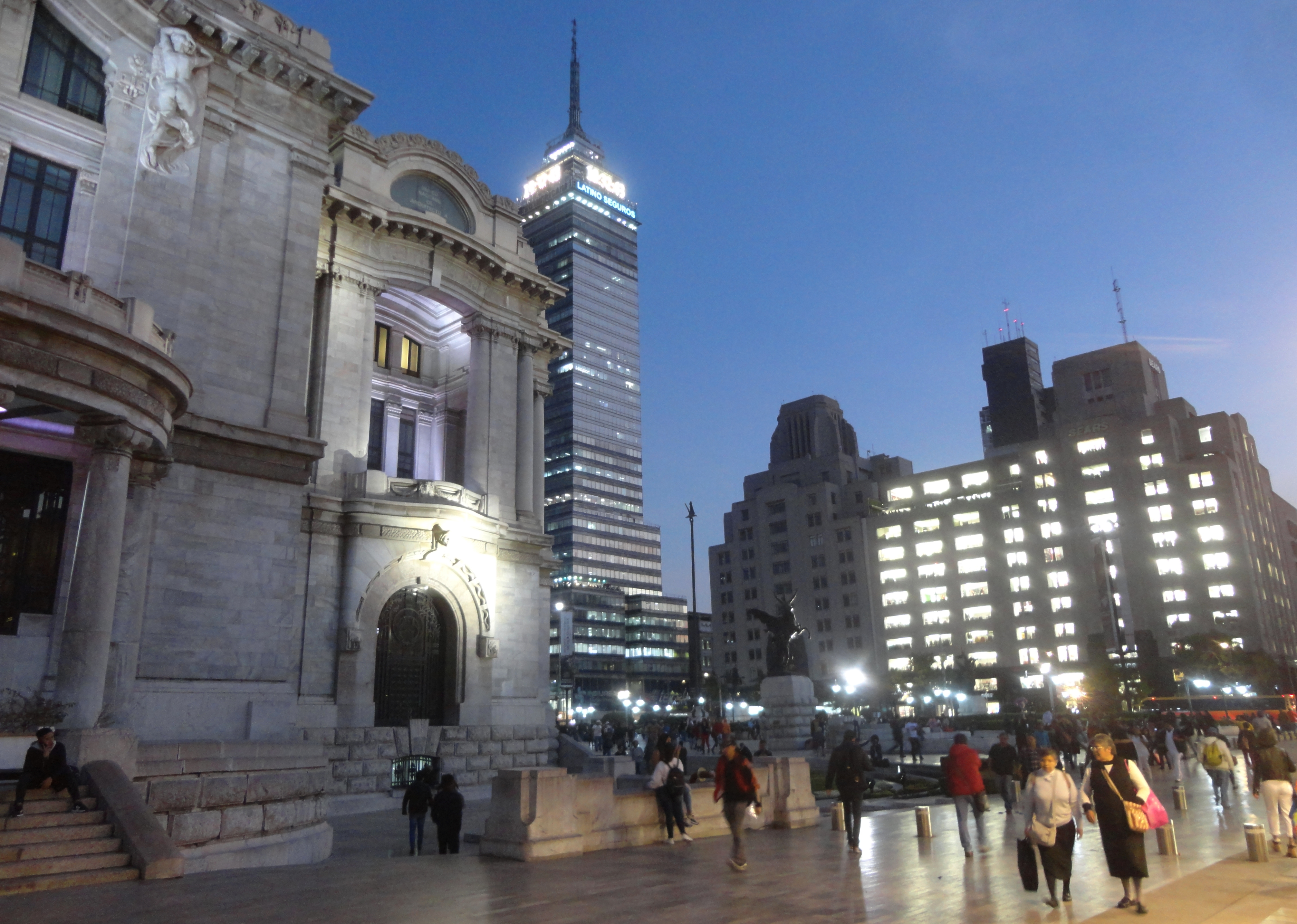 Ciudad de México (CDMX) - Palacio de Bellas Artes, Torre Latinoamericana y Edificio La Nacional